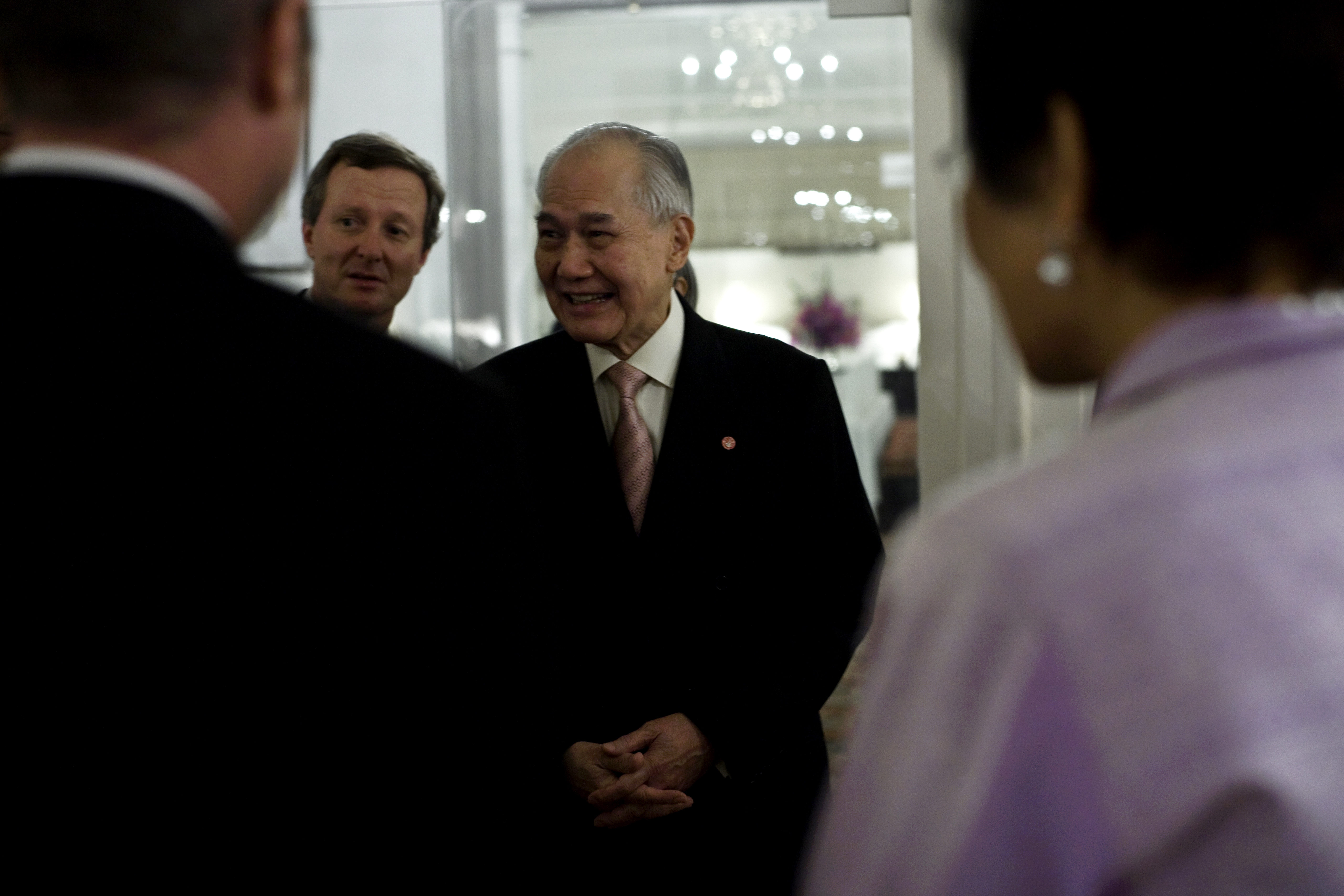 นายกรัฐมนตรีร่วมงานถวายเลี้ยงพระกระยาหารค่ำแด่สมเด็จพระเทพรัตนราชสุดาฯ สยามบรมราชกุมารี ในโอกาสที่ผู้บริหาร British Council เยือนประเทศไทย 12 มกราคม2553 (The Official Site of The Prime Minister of Thailand Photo by พีรพัฒน์ วิมลรังครัตน์)